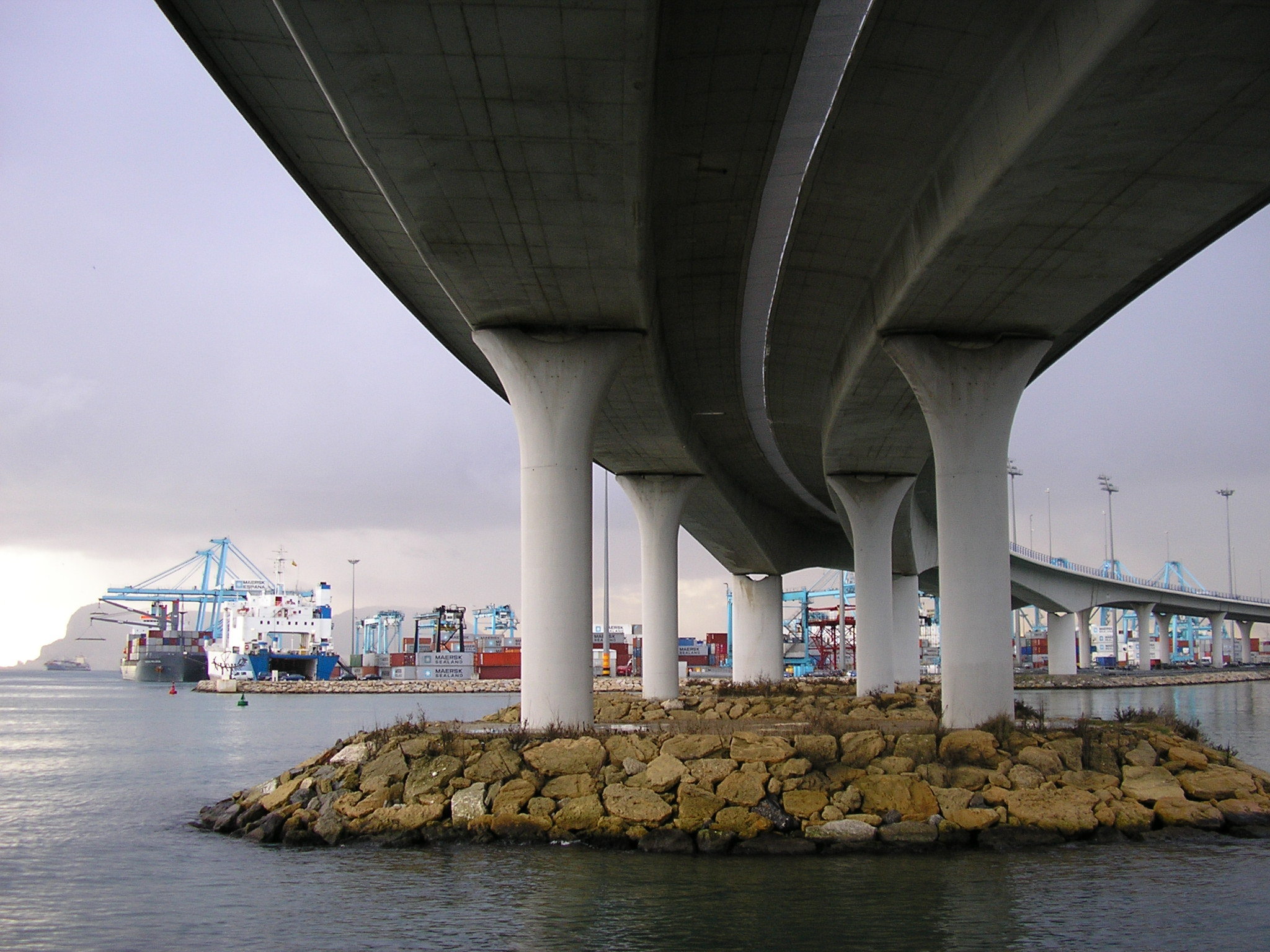 Algeciras, puente de Almanzor Acceso norte al Puerto de Algeciras Fotografía realizada per Carlos Díaz, el 12 de abril de 2006.